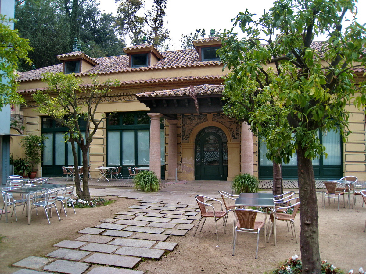 Restaurant de la Font del Gat a Barcelona (Catalunya), obra de Puig i Cadafalch de 1918. Actualment allotja la seu de la Reial Federació Espanyola de Tenis.